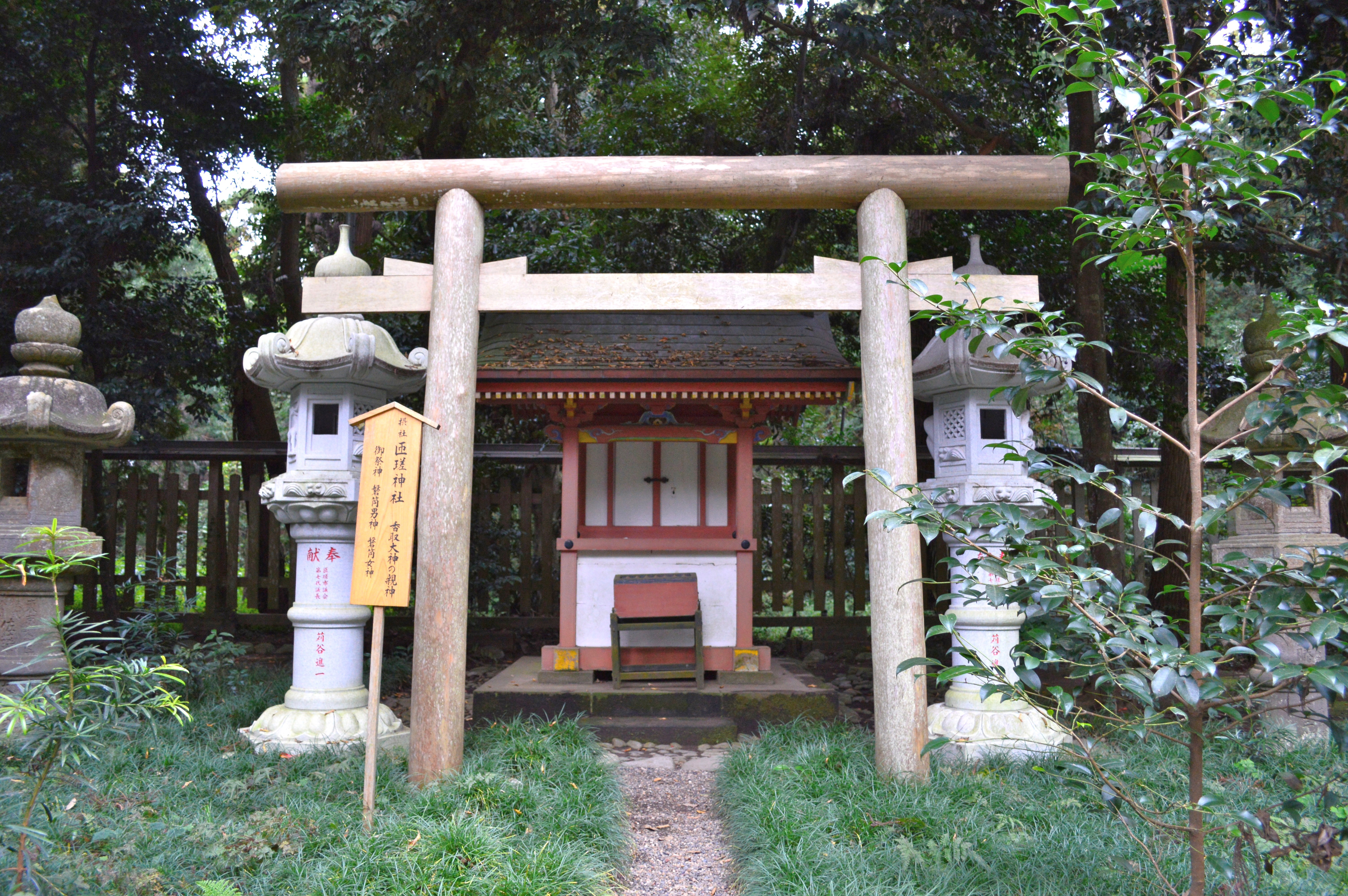 匝瑳神社 (香取神宮境内社)